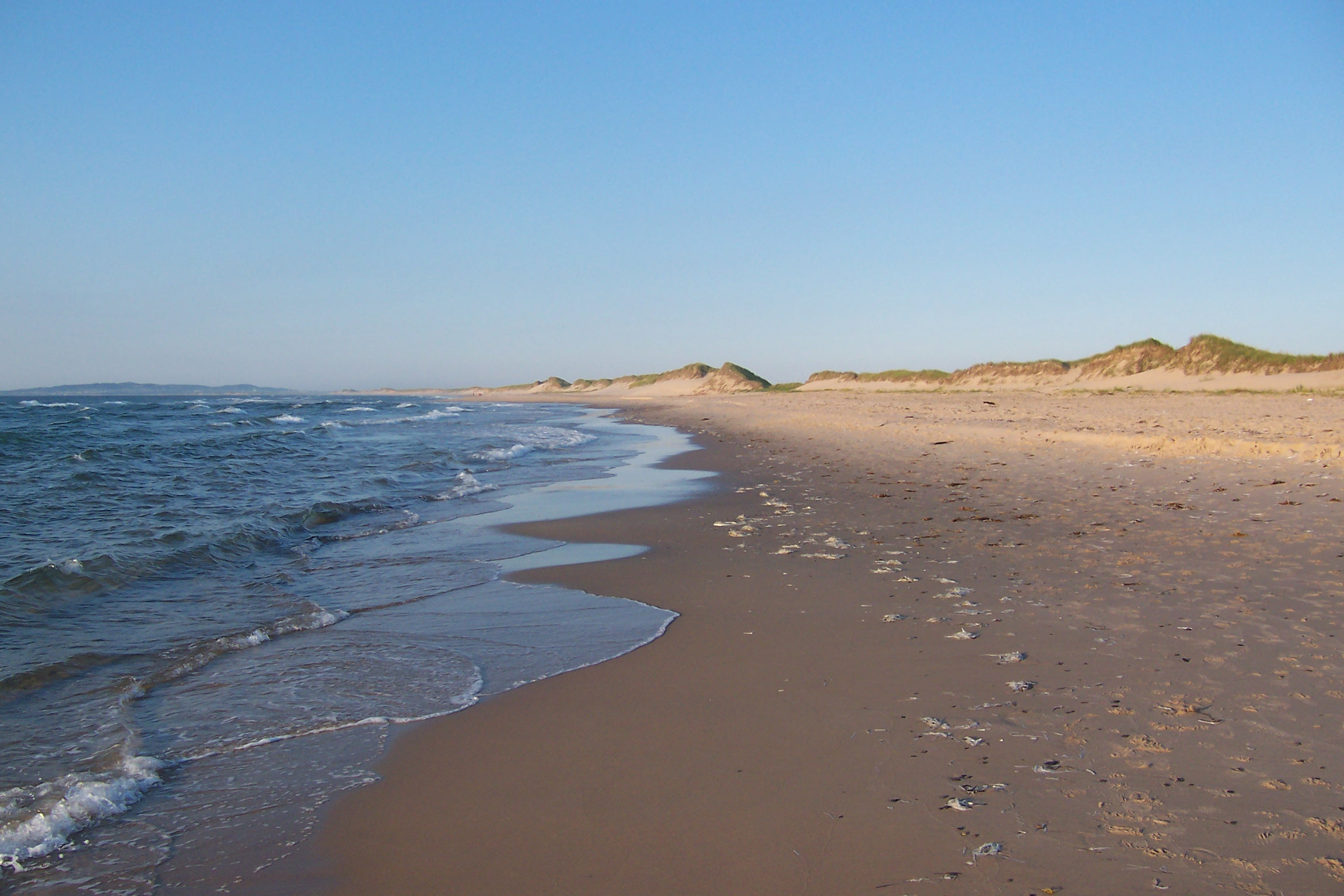 Plage sur la dune ou cordon lagunaire (tombolo) qui relie l'île du Havre Aubert à île de Cap-aux-Meules, Îles de la Madeleine.